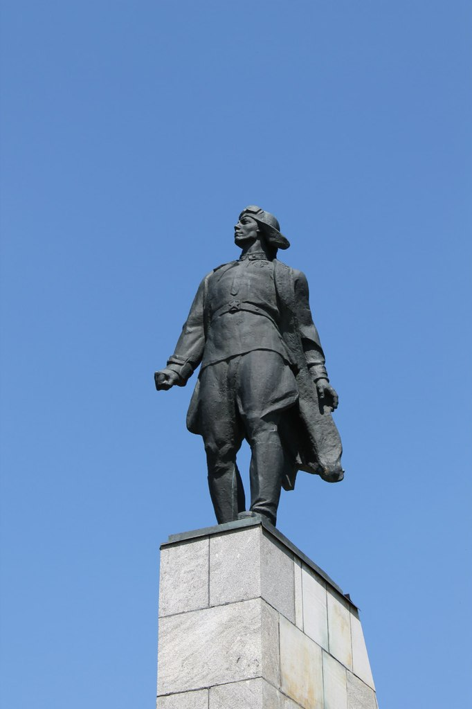 Памятник В.В Талалихину в Кузнечиках. Фото 8.05.2013